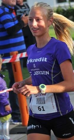 Nanna Bagger, dansk atlet. Her ved 24 timers løbet 2013 i Viborg.